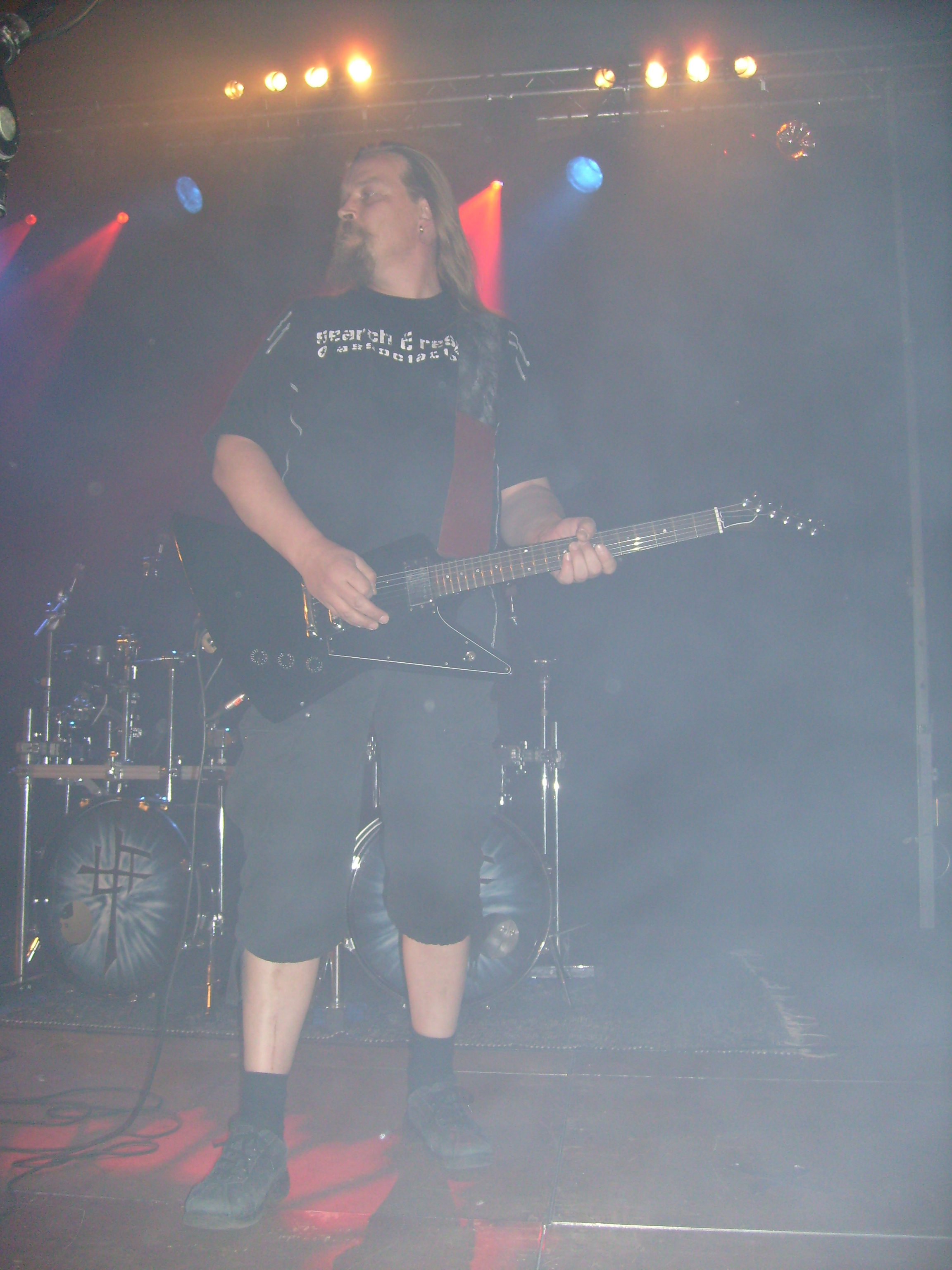 Guitarist Antti Honkkila at Kranni Kospeli 2008.